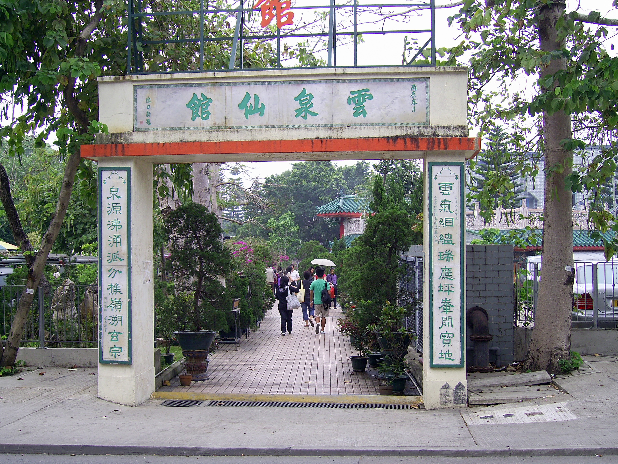 中文（香港）: 雲泉仙館門樓